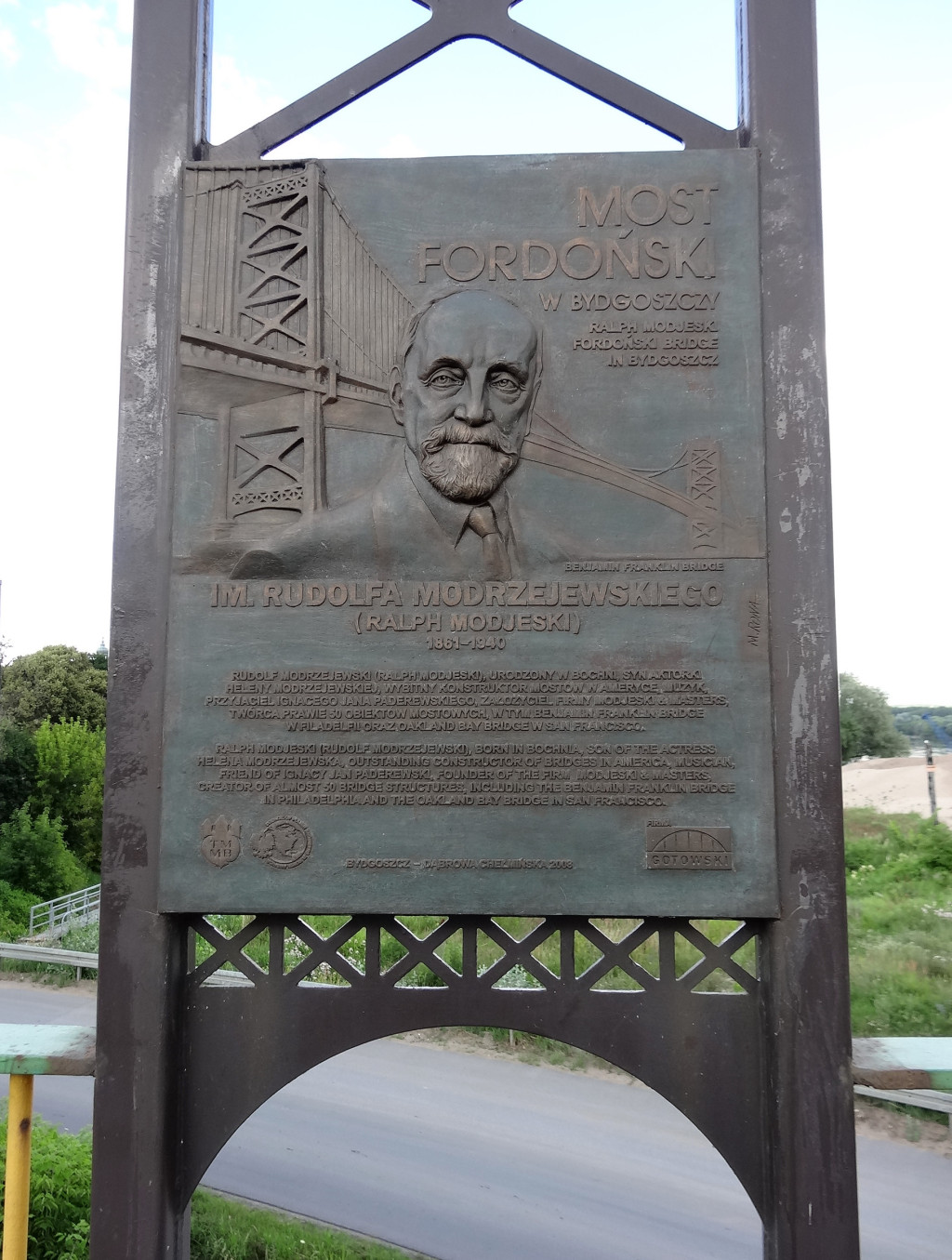 Most fordoński im. Rudolfa Modrzejewskiego nad Wisłą w Bydgoszczy-Fordonie. Tablica pamiątkowa patrona mostu